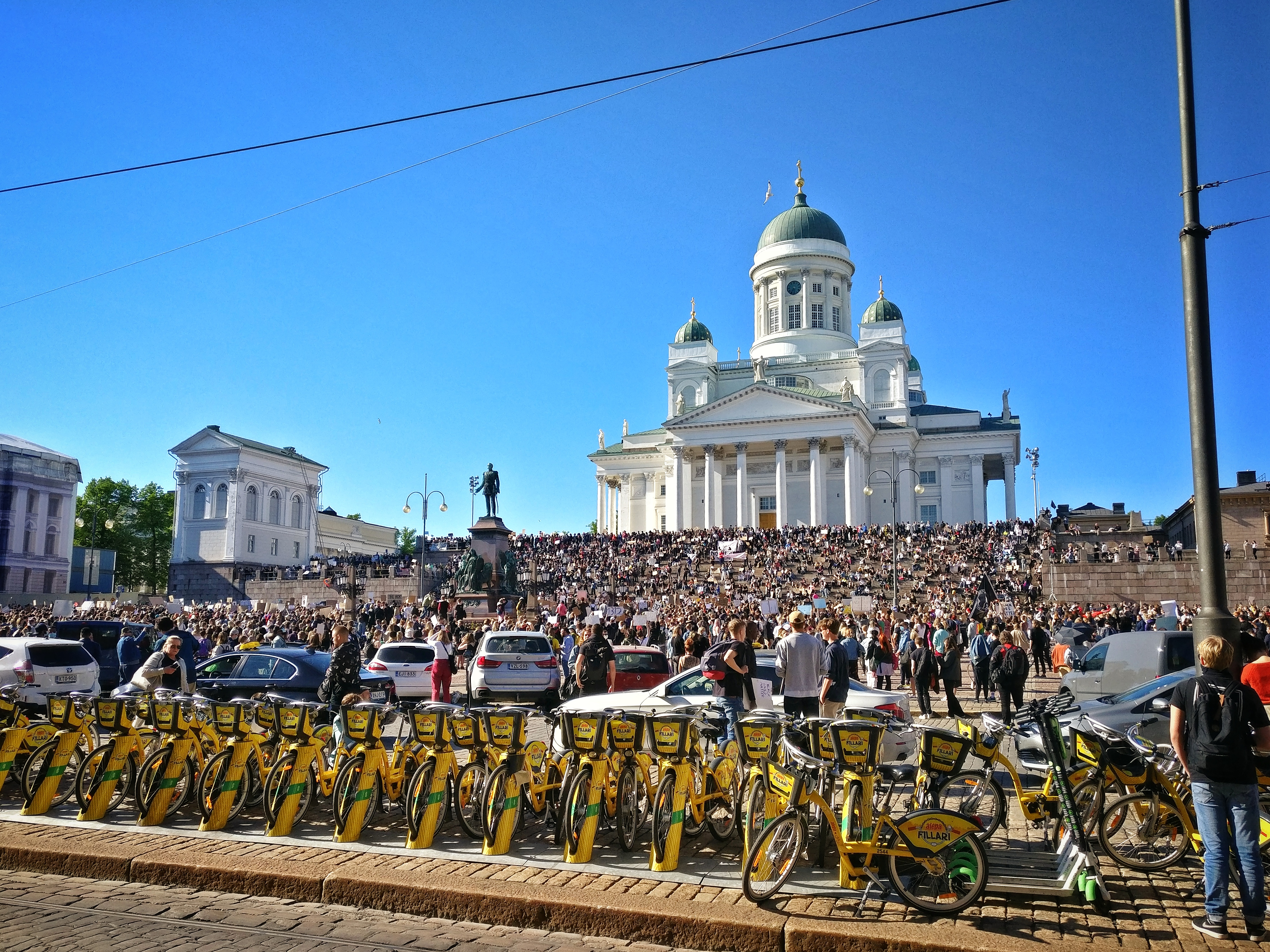 IMG_20200603_173649-01